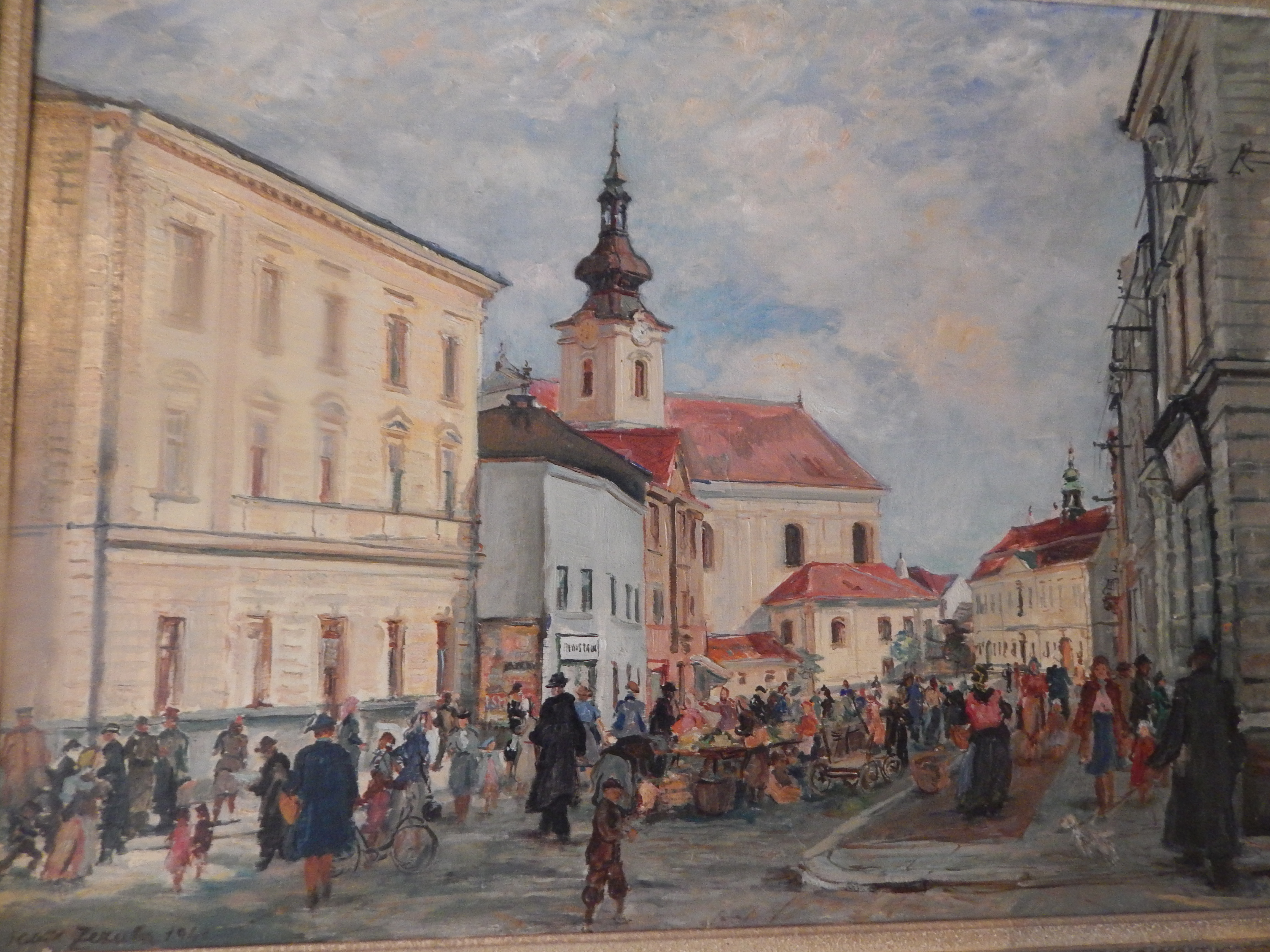 pohled na historickou část Kroměříže s kostelem Panny Marie v pozadí - olej na plátně